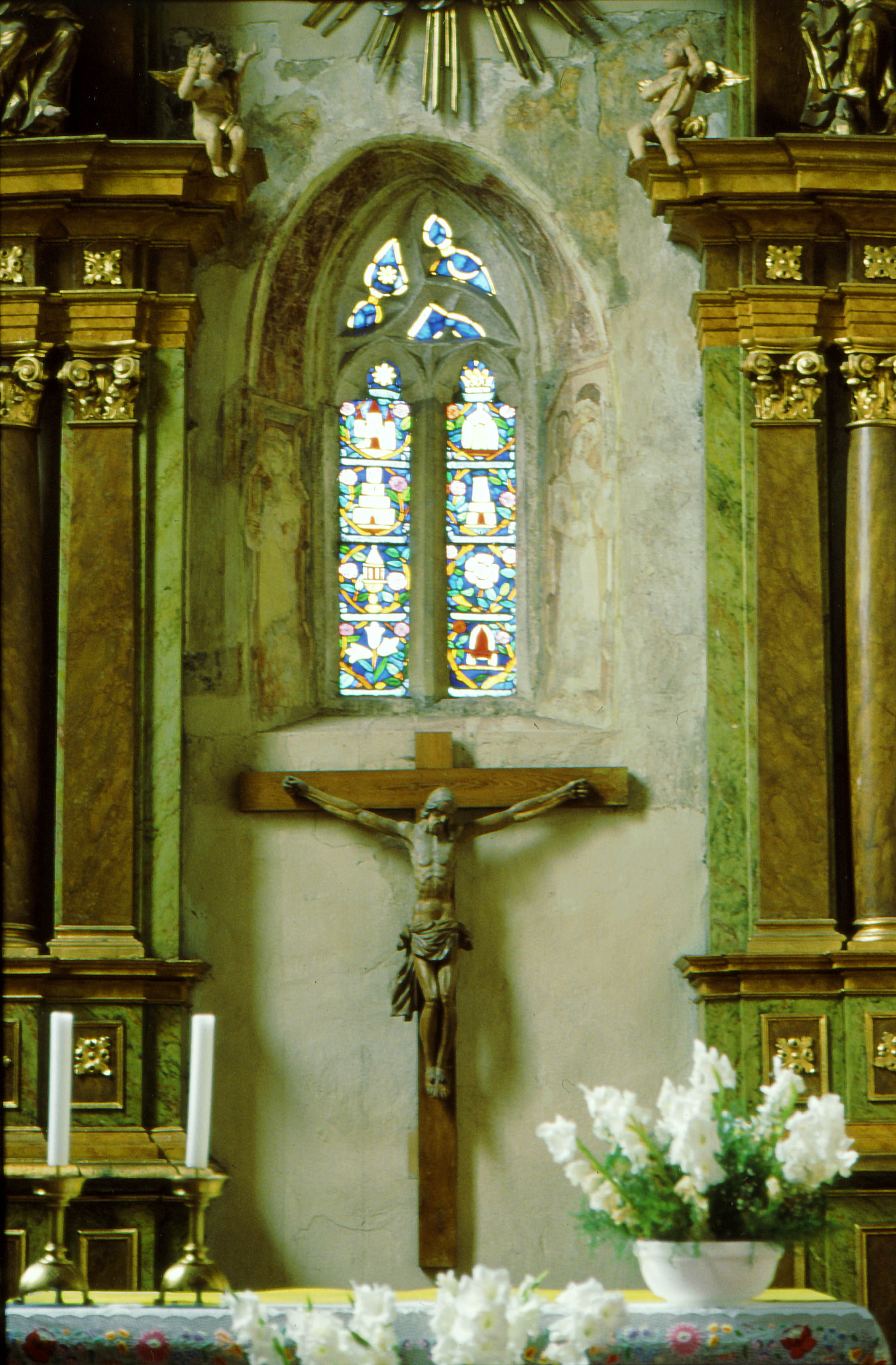 A tereskei római katolikus templom oltára barokk díszítéssel (Nógrád megye, Magyarország)